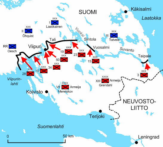 Karjalankannas talvisodan viimeisenä päivänä 13 maaliskuuta 1940.